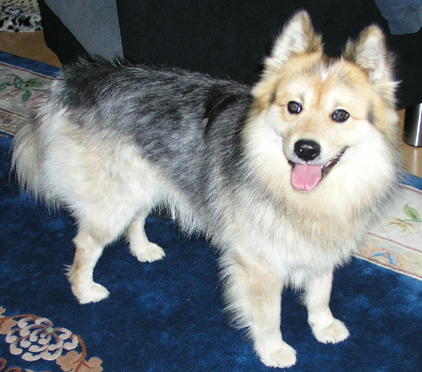 Elo (Hunderasse)